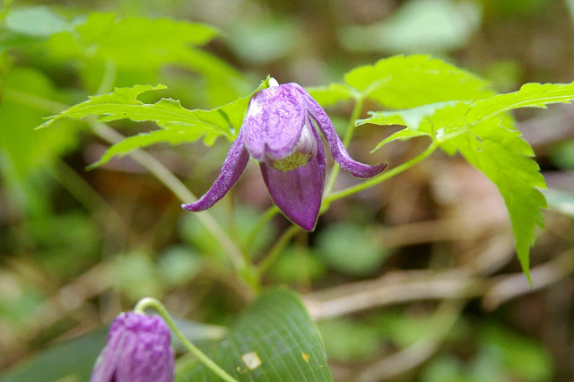 ミヤマハンショウヅル （北海道斜里町） Clematis alpina ssp. ochotensis (shari, Hokkaido, JAPAN)